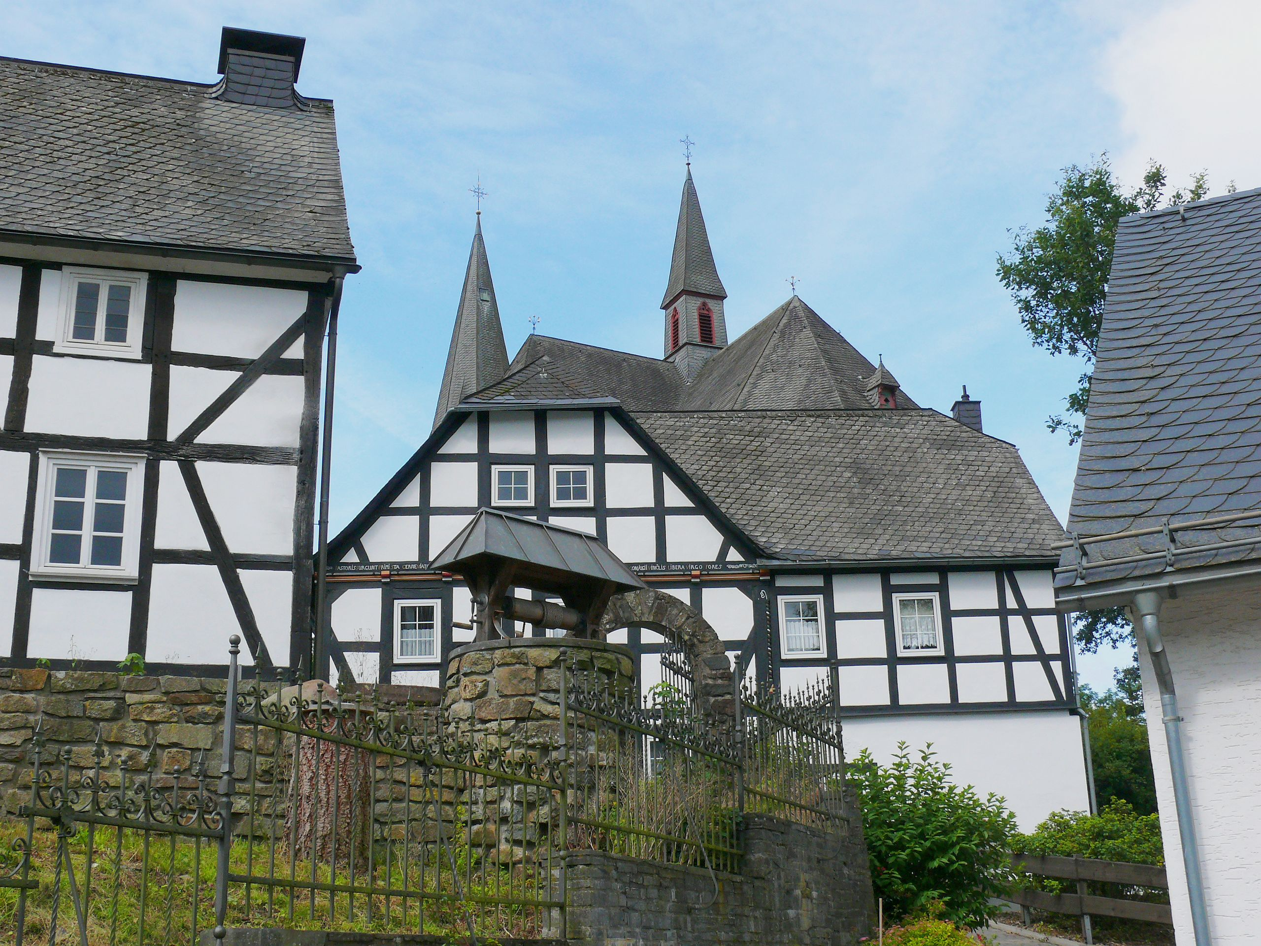 Schöne Fachwerkhäuser in Assinghausen mit altem Brunnen